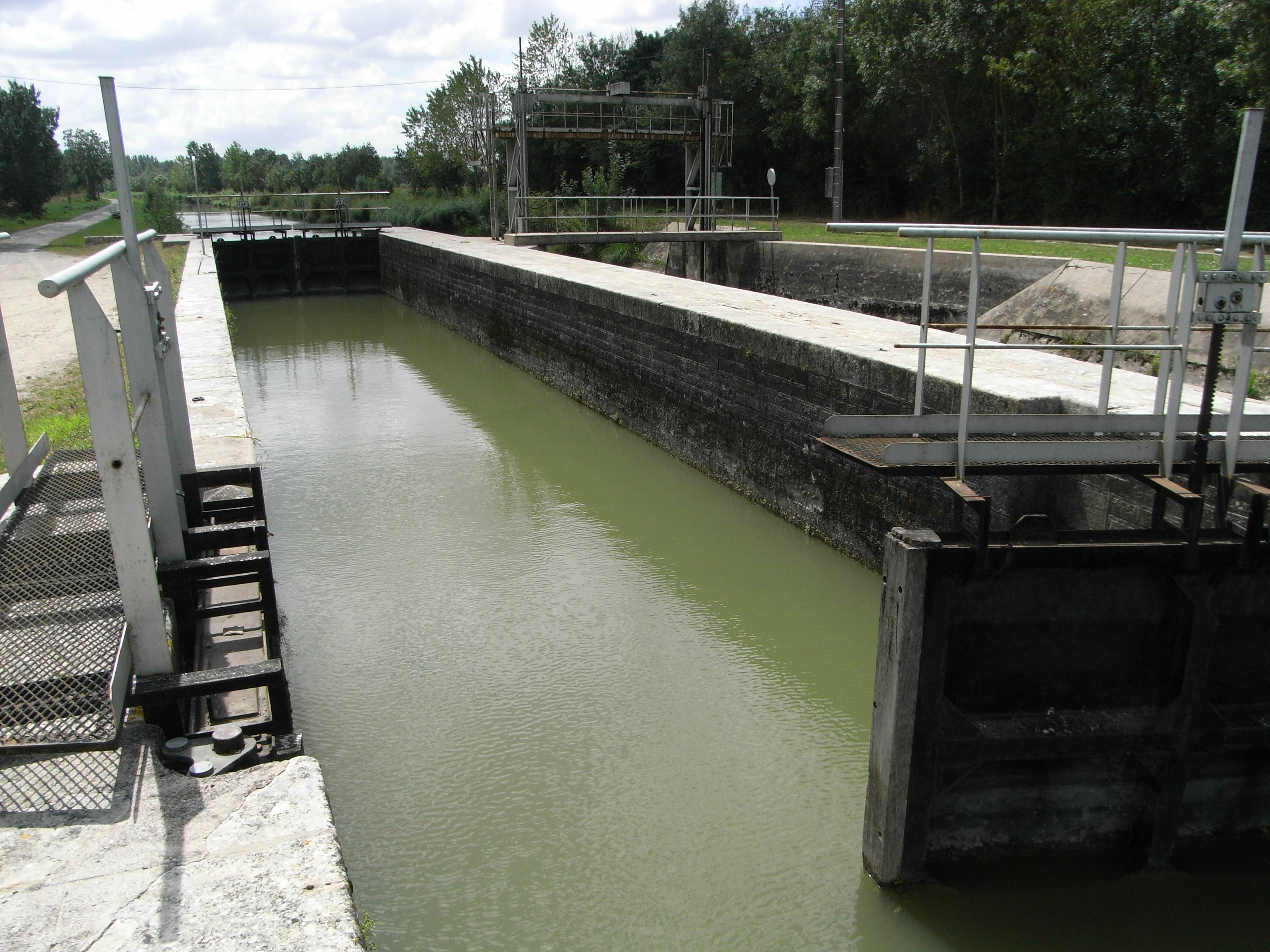 Écluse (n° 3) du Canal du Mignon dans le Marais Poitevin en France.